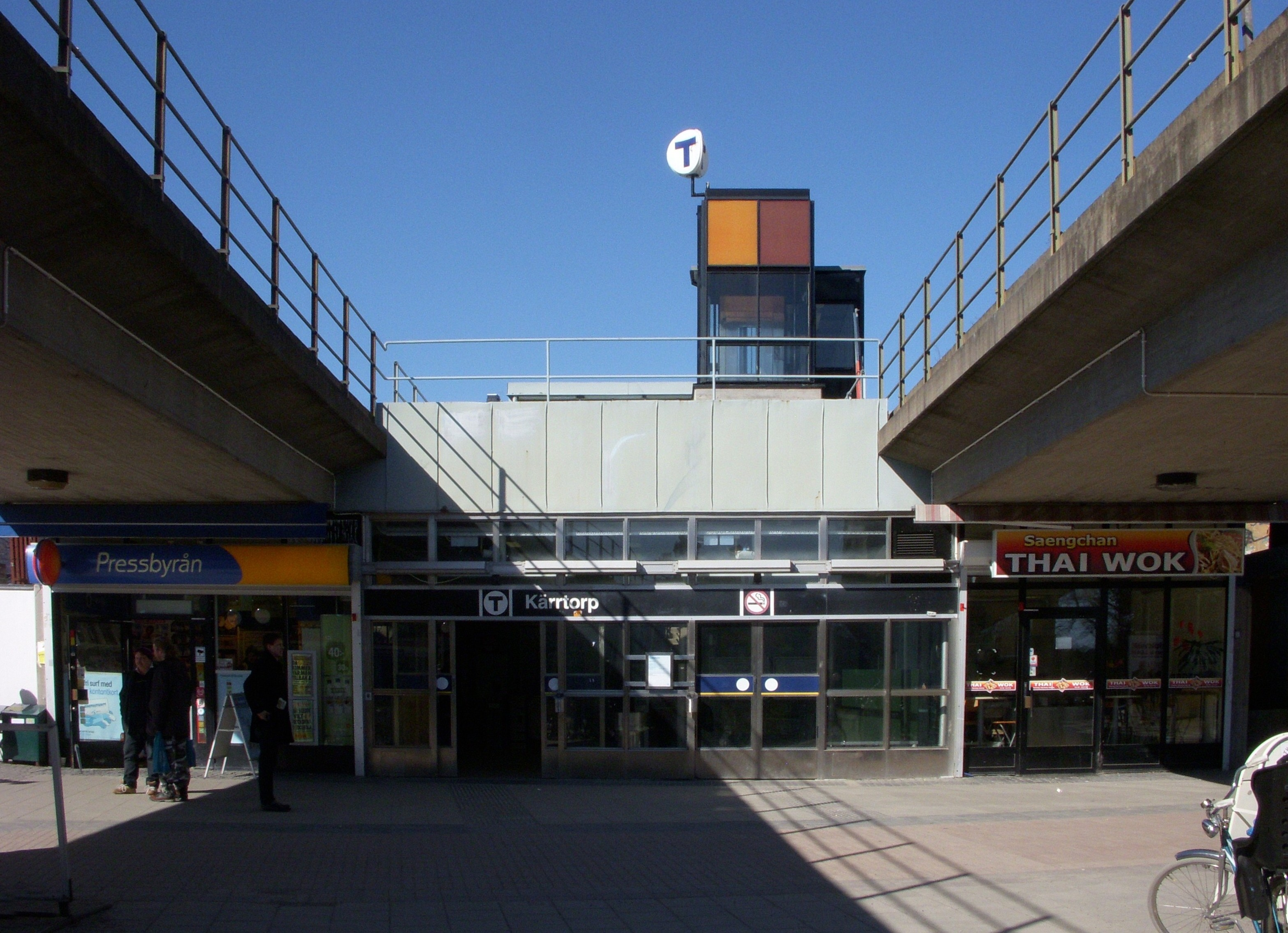 Kärrtorps tunnelbanestation